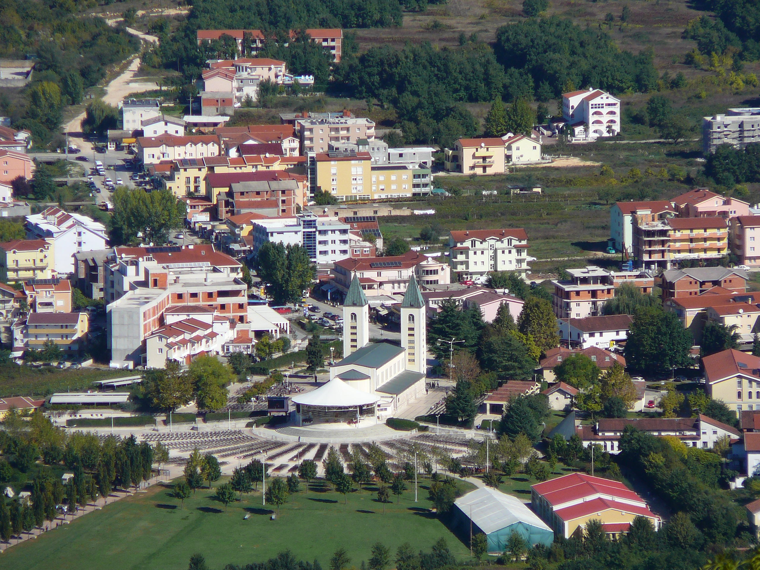 La chiesa parrocchiale di Međugorje dal Križevac